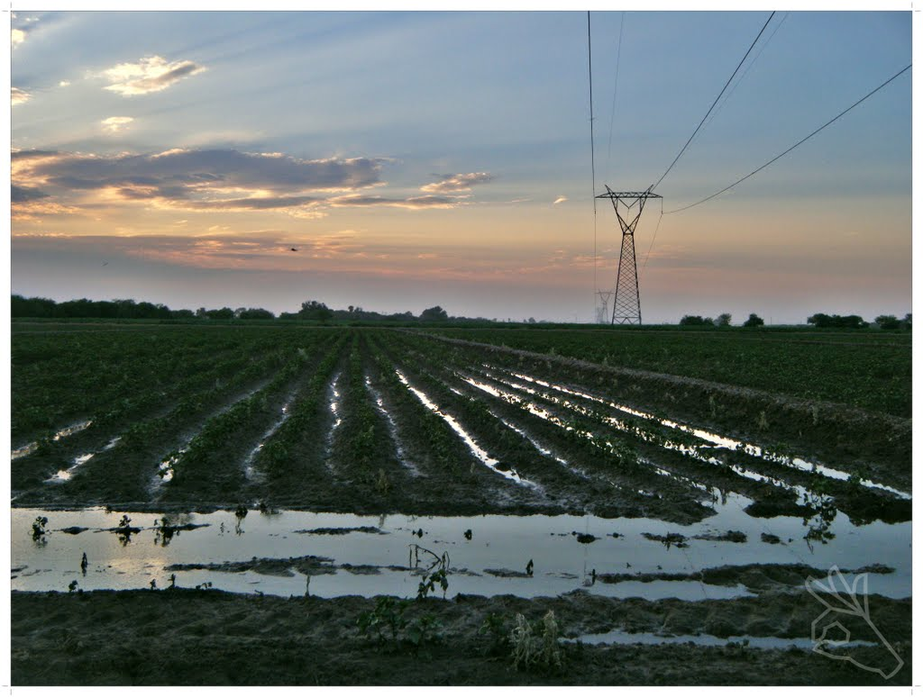 sembradios